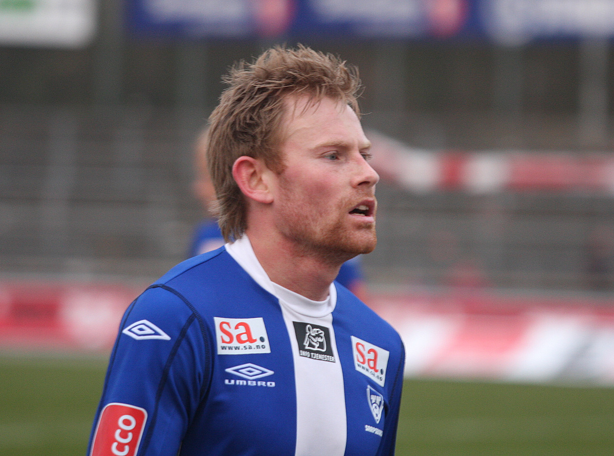 Michael_Røn, Sarpsborg 08